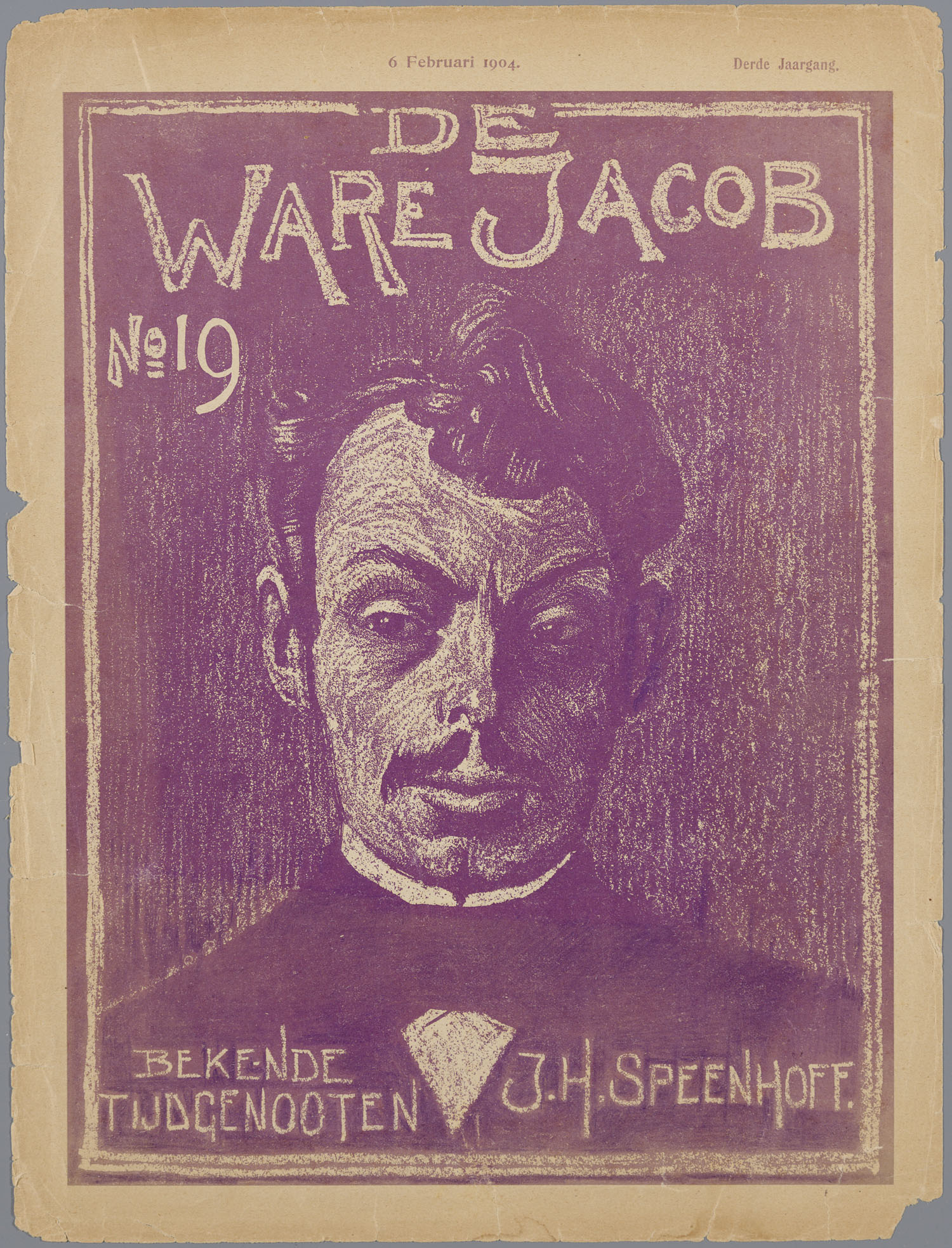 Koos Speenhoff op het omslag van het tijdschrift De ware Jacob van 6 februari 1904. Website Het Geheugen van Nederland meldt: "Gedrukt portret in paars met wit krijtachtig uiterlijk, met Speenhoff en face. Op de achterzijde een gedicht van (pseud.) J.H. Peehnsoff opgedragen aan J.H. Speenhoff, en een ingezonden stuk over politiek."